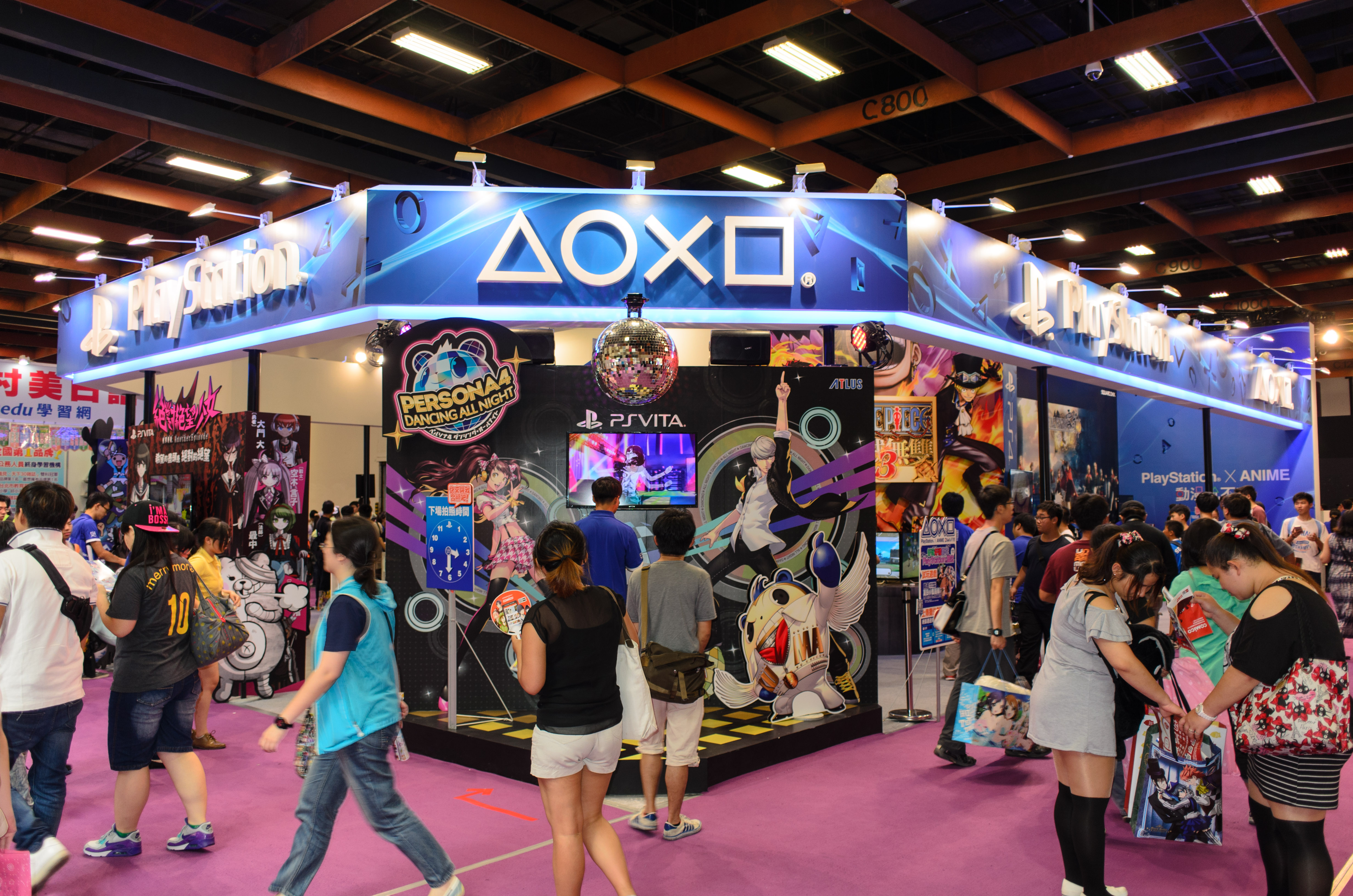 2015漫畫博覽會首日下午，台灣索尼電腦娛樂攤位。